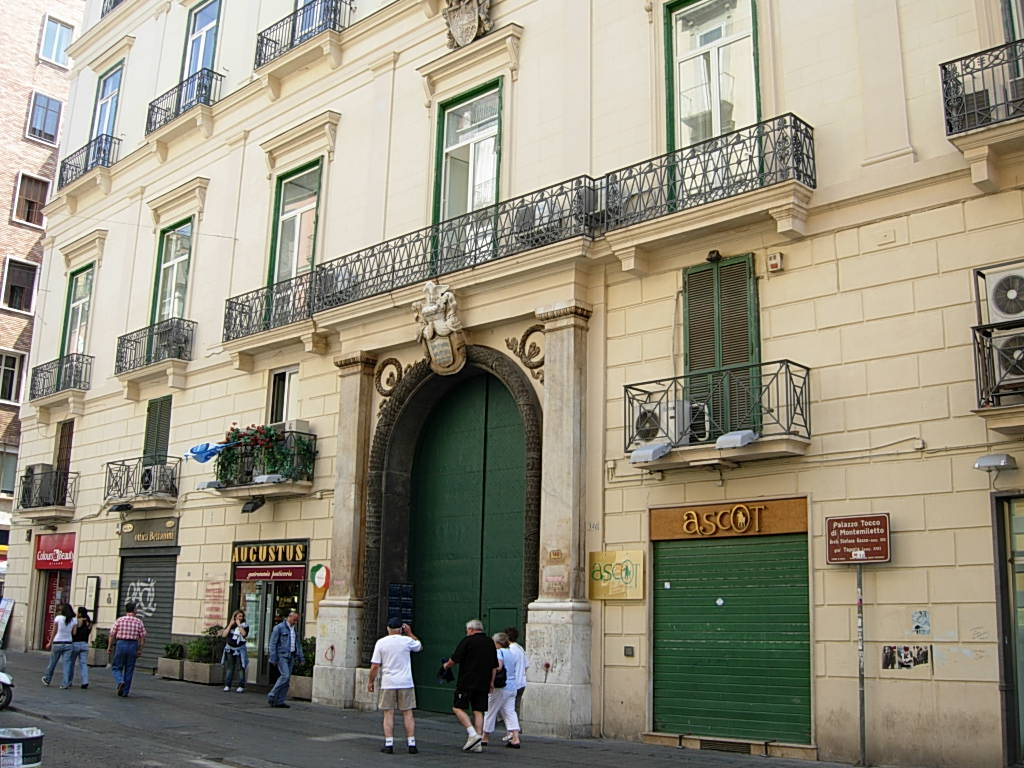 Palazzo Tocco di Montemiletto in Napoli Foto personale concessa in PD